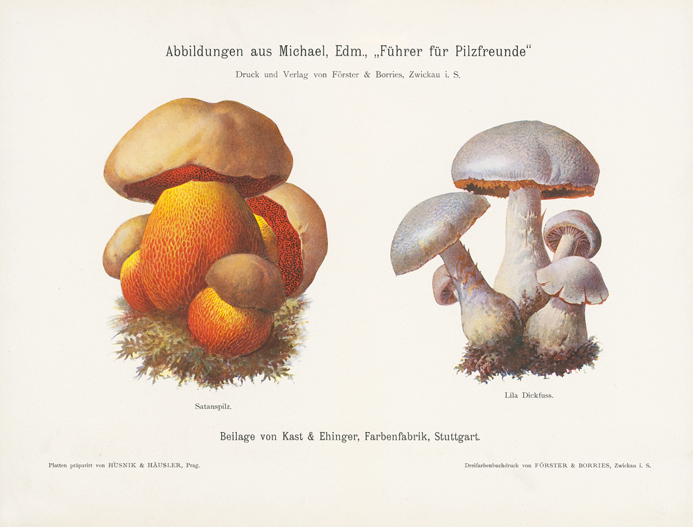 Dreifarbenbuchdruck - Abbildungen aus Edmund Michaels "Führer für Pilzfreunde". Druck und Verlag von Förster & Borries, Zwickau i. S.